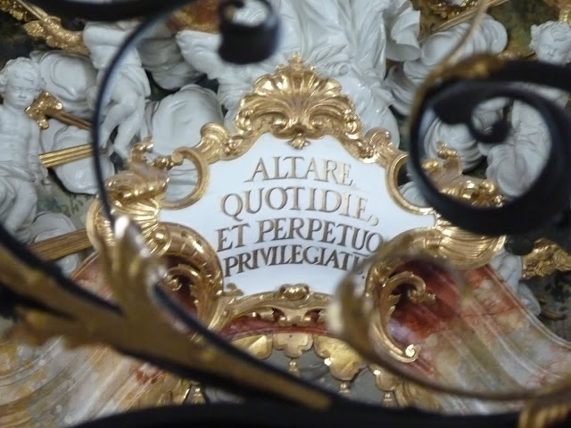 Altarinschrift in der Karlskirche in Volders in der Grabkapelle der Familie Fieger (links, nördlich, 1696)